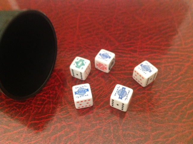 Ejemplo del tipo de dados que se utilizan en el juego.